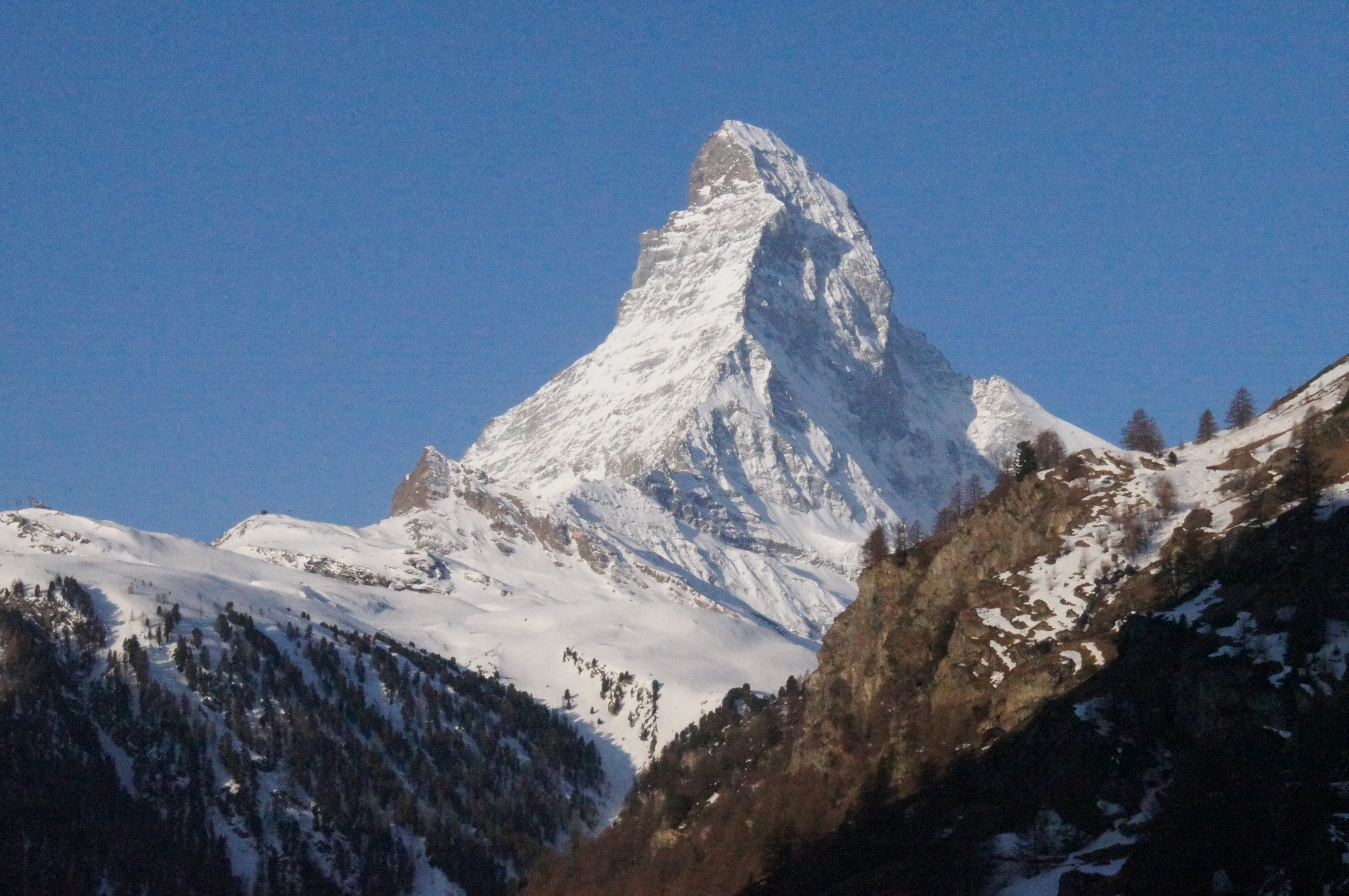 Cervin